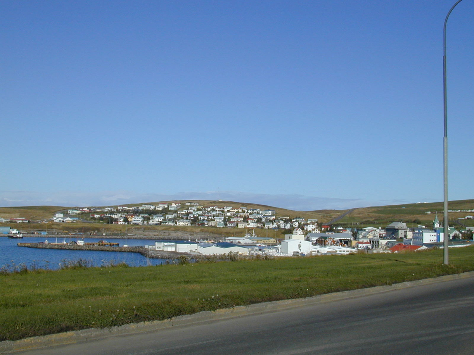 Der Ort Húsavík